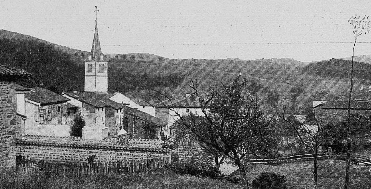 Dictionnaire illustré des communes du département du Rhône. Tome 1 / par MM. E. de Rolland et D. Clouzet.